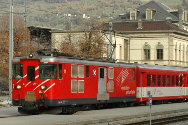 Matterhorn-Gotthard-Bahn(MGB) Deh 4/4I nr: 51 op 31 oktober 2006 te Brig.